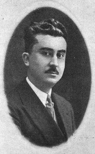 Salvador García-Bodaño Fernández, fotografía en Vida Gallega 1931